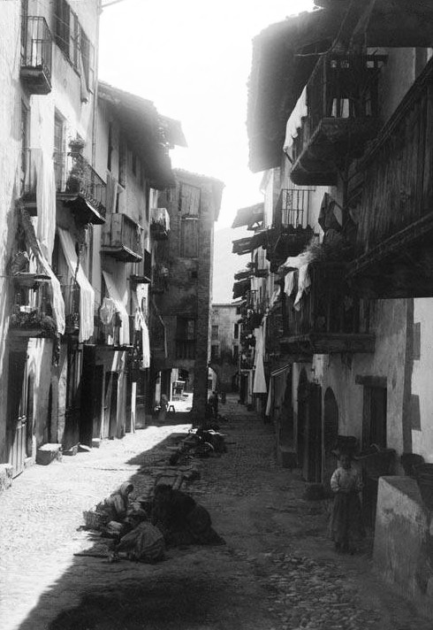 Imatge